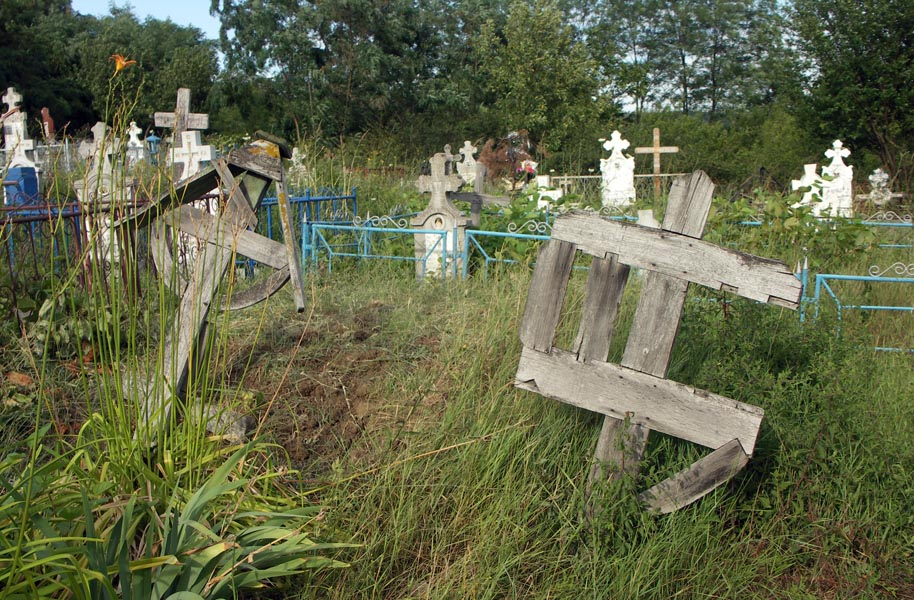 Cruci din cimitir. Foto: Alexandru Baboş, iulie 2007.